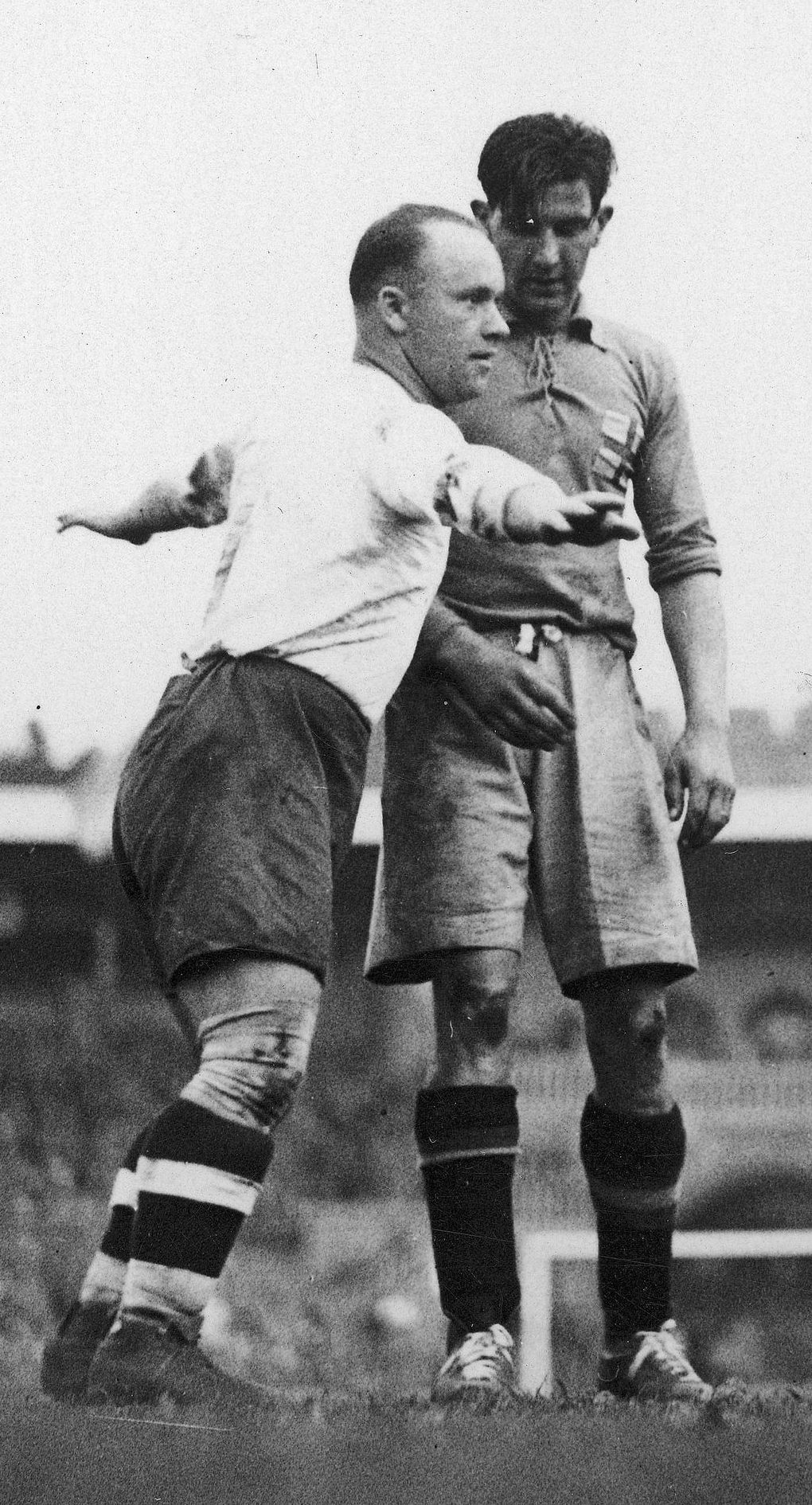 Fragment meczu. Rzut wolny dla drużyny szwedzkiej. Widoczni od lewej: Henryk Martyna i Gunnar Jansson.